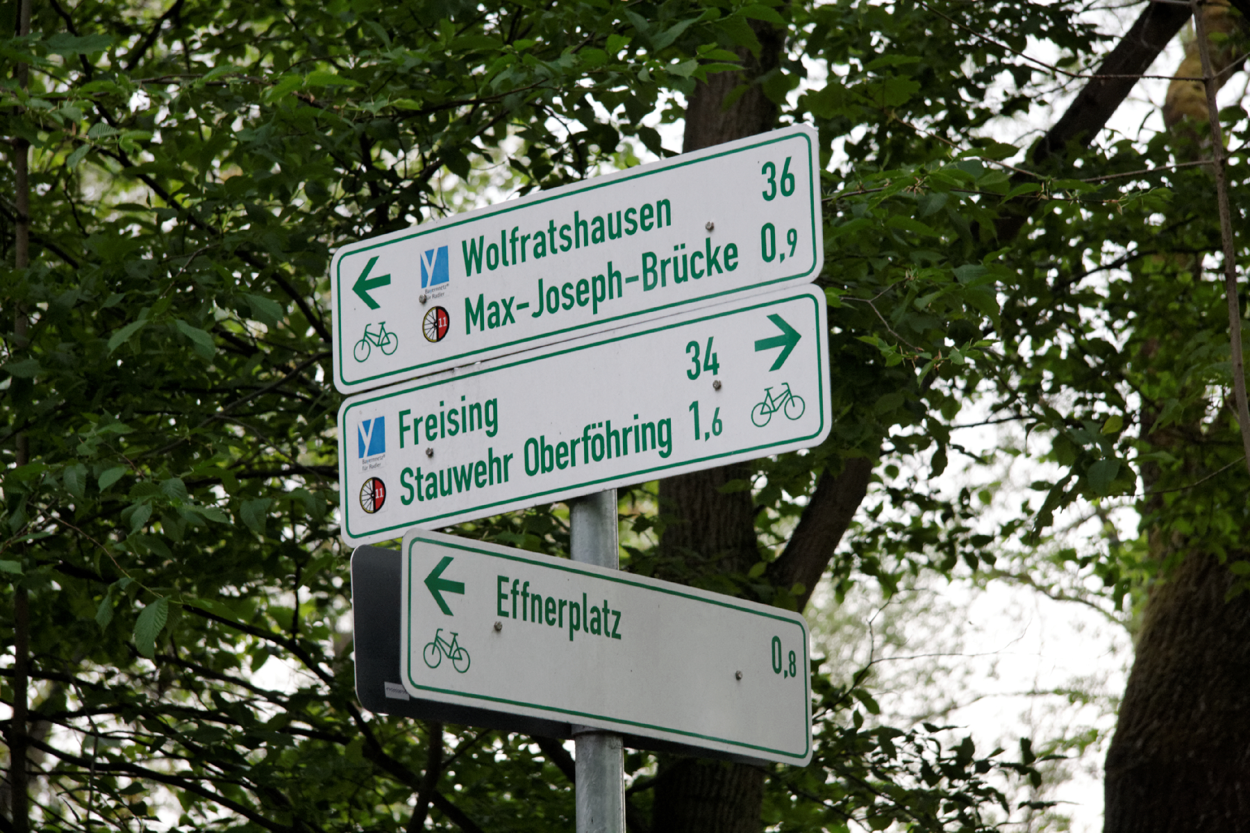 Fahrradwegweiser an der Isar in München